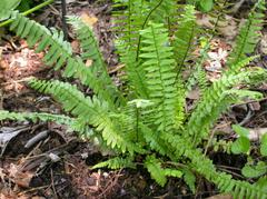 merupakan jenis tumbuhan